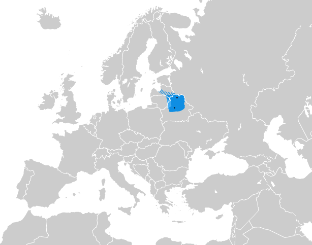 Карта Полоцького князівства